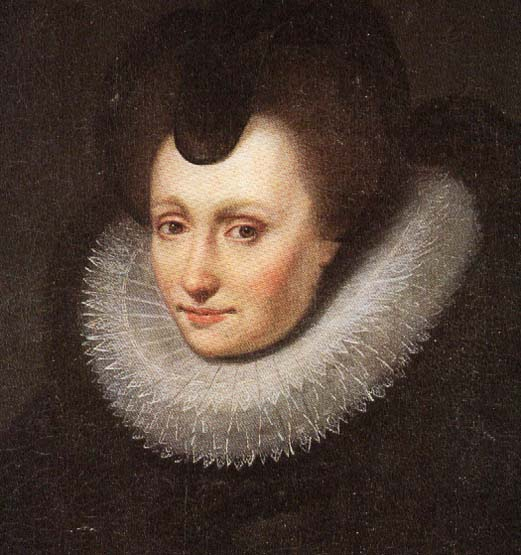 Louise de Coligny (1555-1620), overleed in Frankrijk